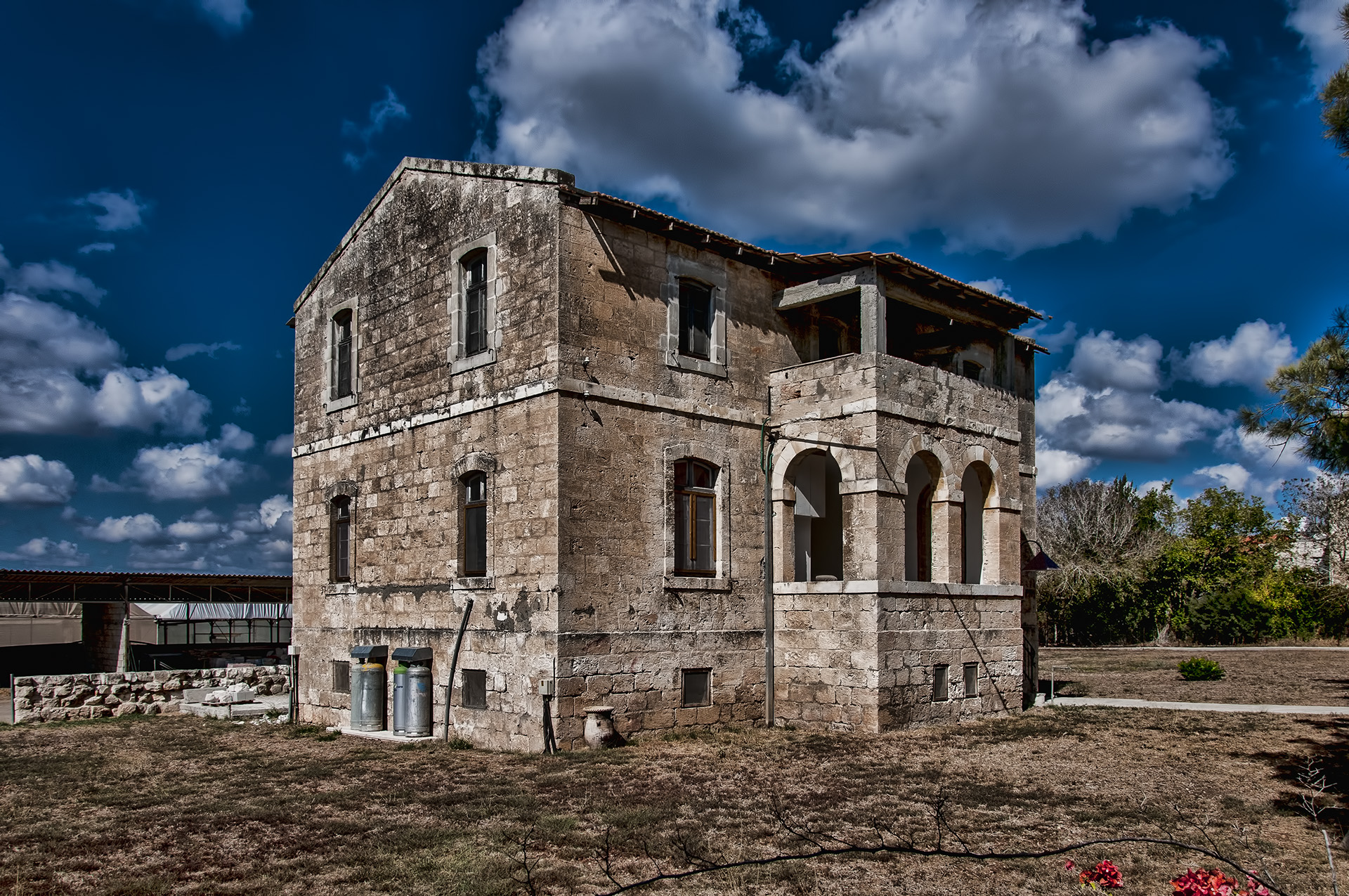 ראשוני המתיישבים באתר היישוב אלוני אבא היו בני הדור השני של תנועת הטמפלרים הגרמנים, אשר הקימו במקום בשנת 1907 מושבה חקלאית קטנה ושמה "ולדהיים".